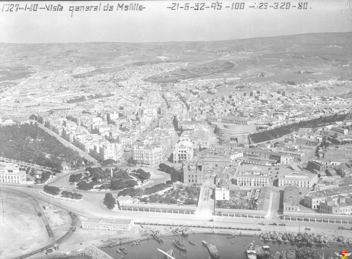 Centro de Melilla, Parque Hernández, Plaza de España, Barrio Héroes de España y Mantelete